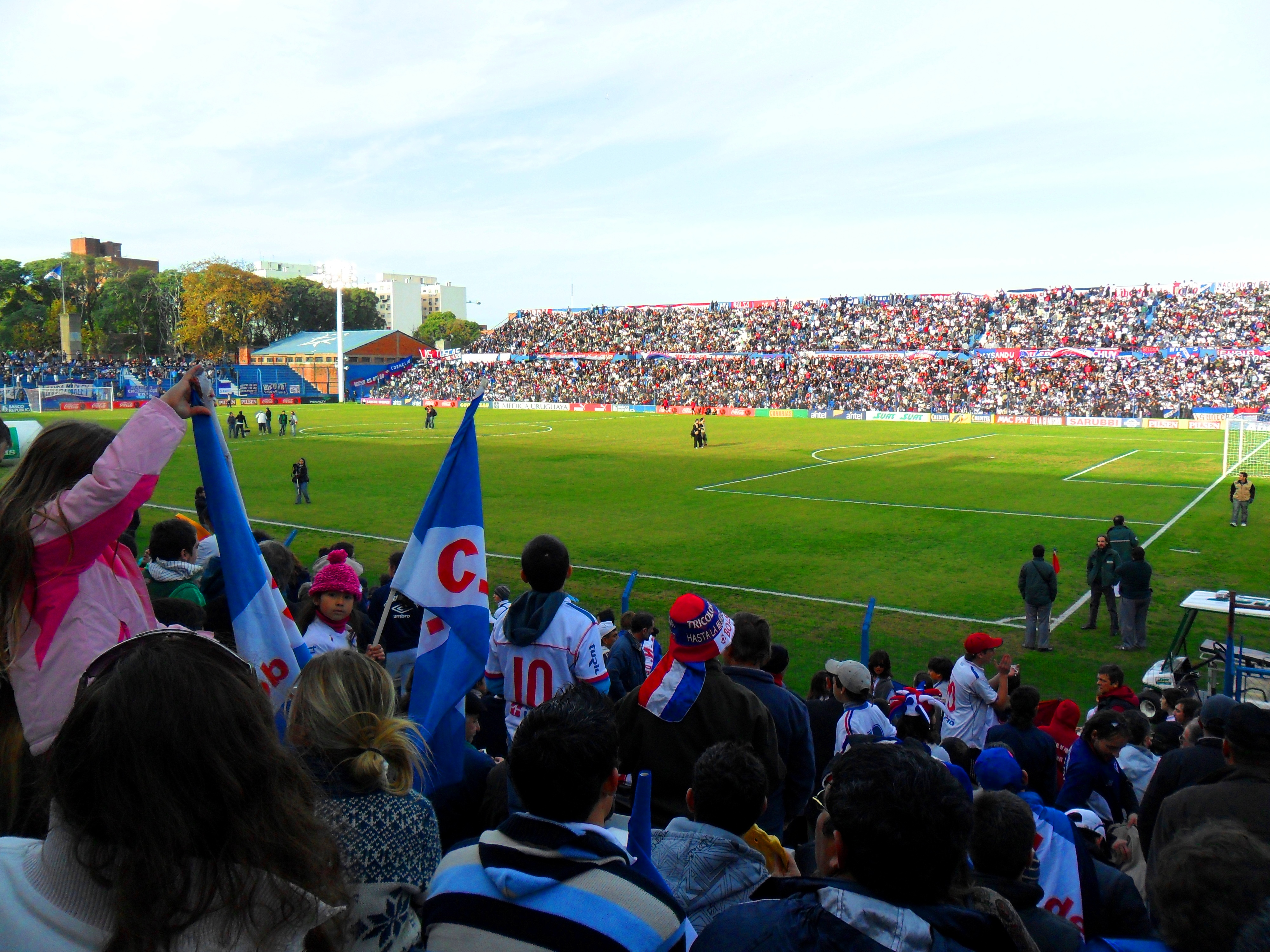 Encuentro entre Nacional y Defensor Sporting, disputado el 28 de mayo de 2011 en el Estadio Gran Parque Central por el Torneo Uruguayo